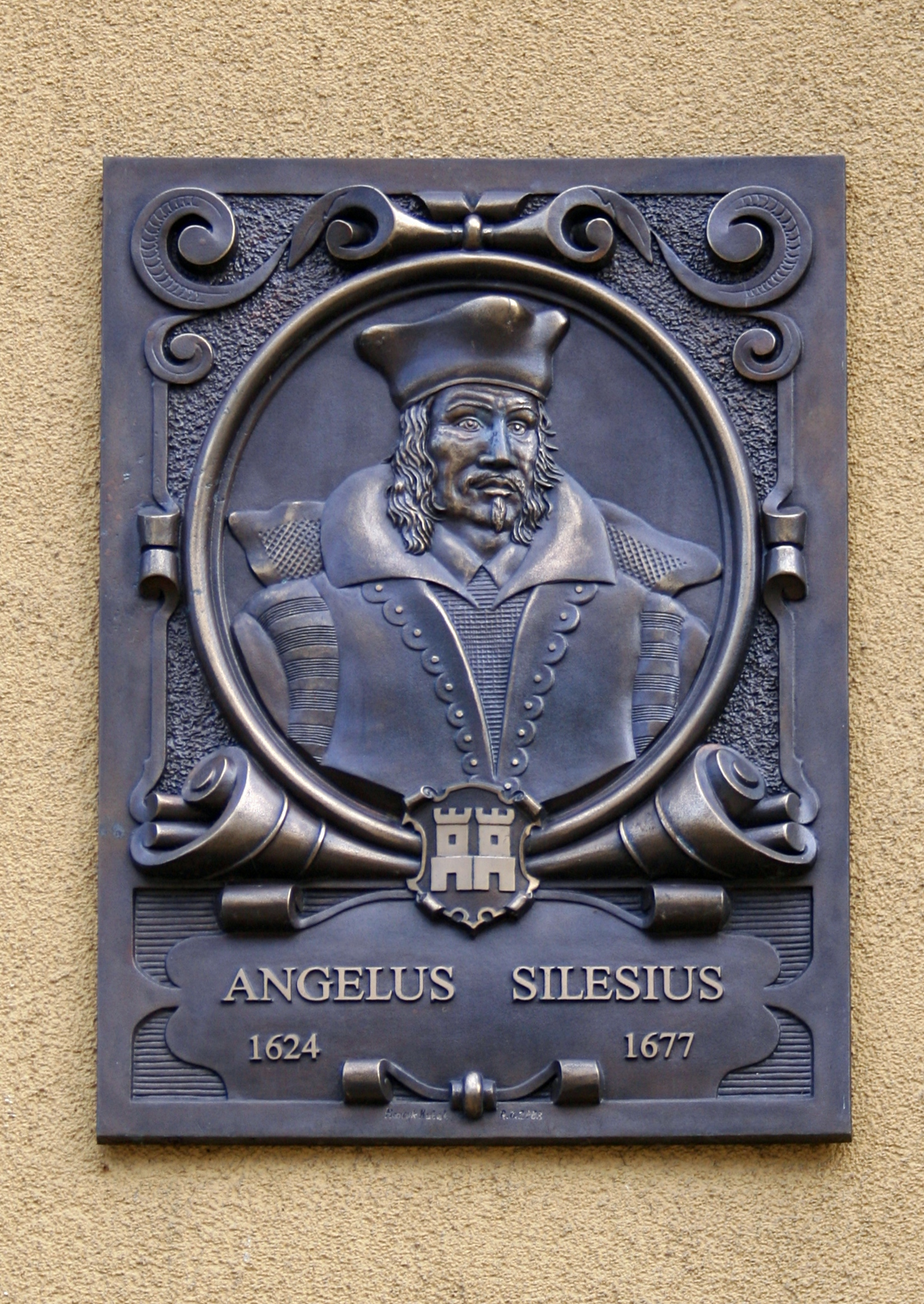 Zabliczka przedstawiająca Angelusa Silesiusa na ścianie zamku Czettritzów w Wałbrzychu